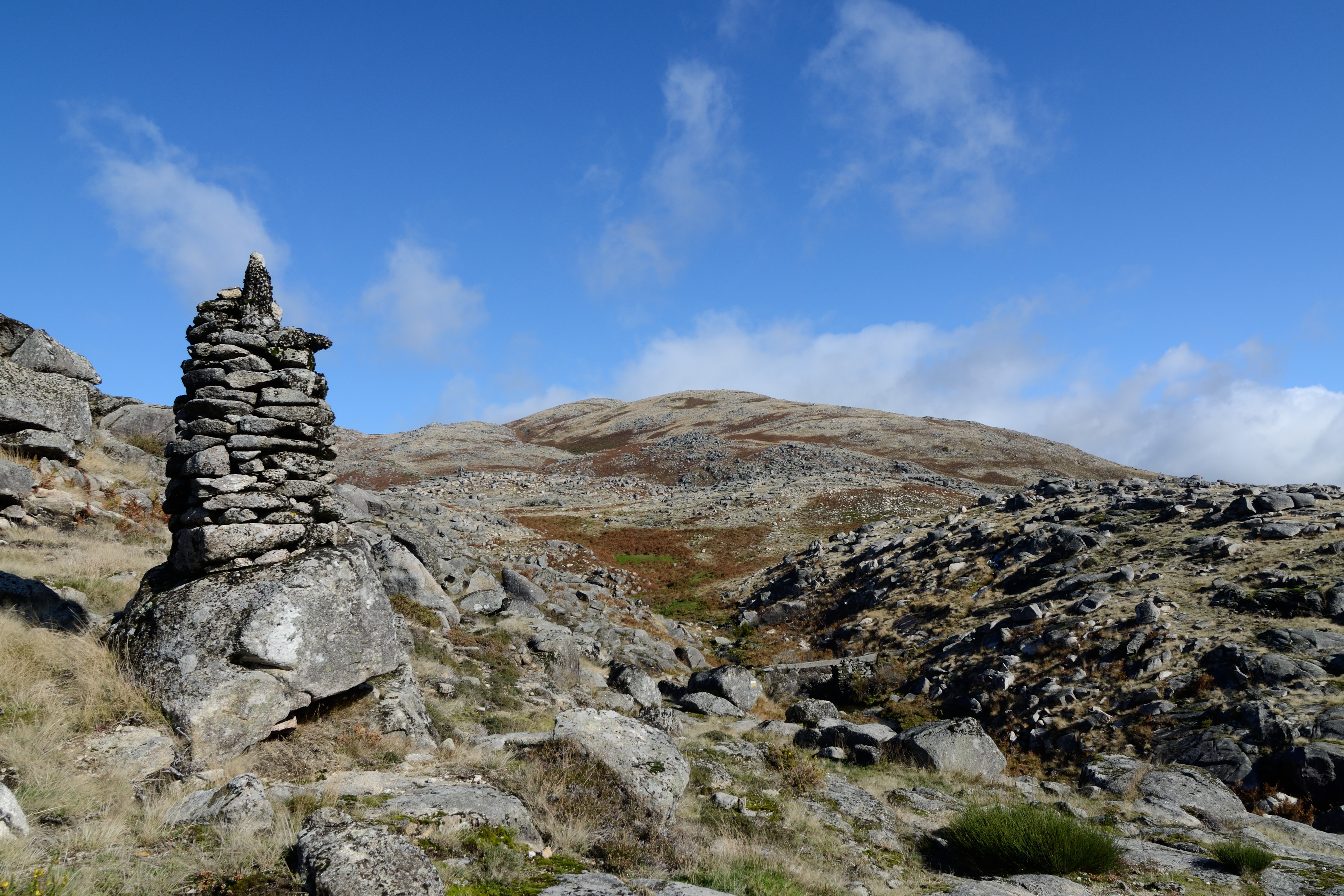 Brufe, Terras de Bouro, Portugal [2012]